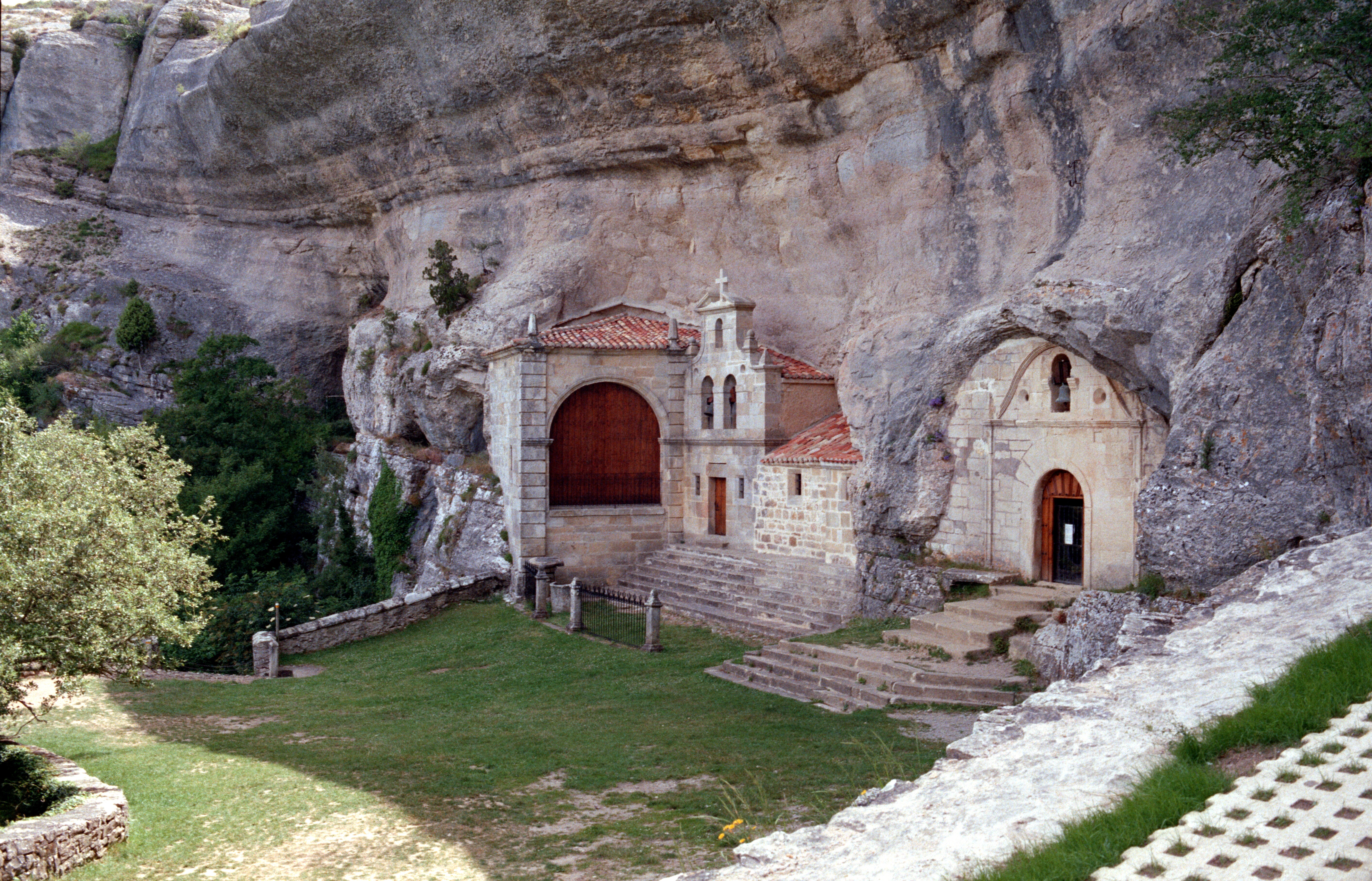 Ojo Guareña